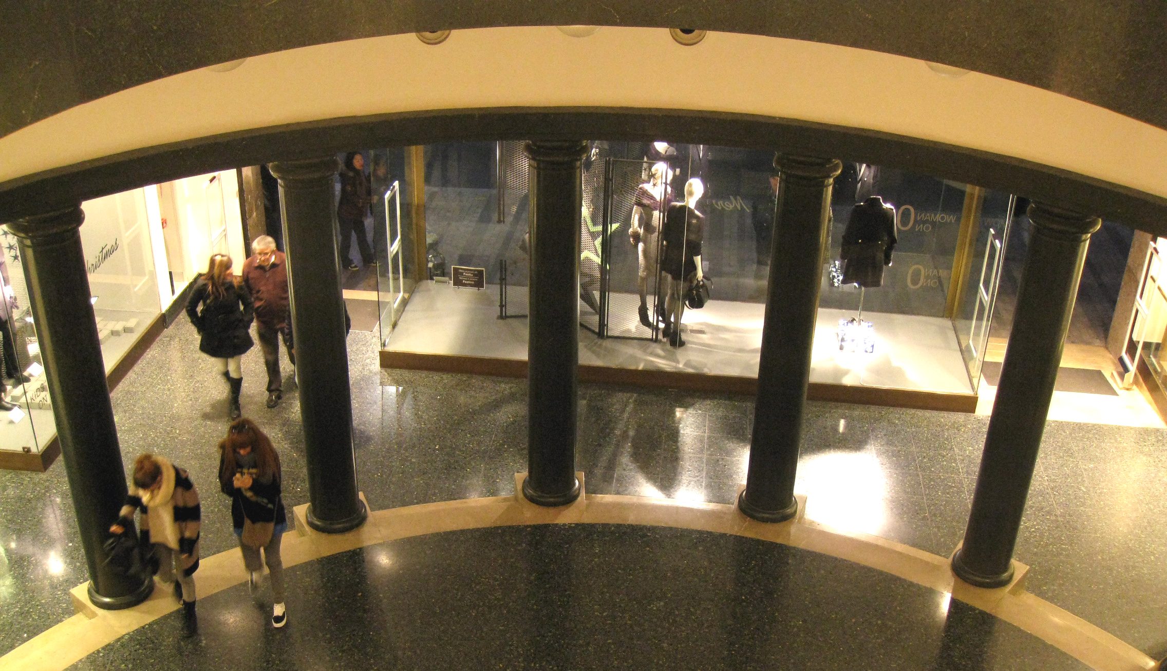 Antic cinema La Rambla, a la Rambla d'Ègara núm. 146 (Terrassa). Edifici racionalista del 1935. Actualment acull comerços i una entitat bancària als baixos. La botiga de roba Zara n'ocupa la part central, que inclou el vestíbul, la sala i l'escenari de l'antic cinema. Vista de les columnes del vestíbul des del pis de dalt.